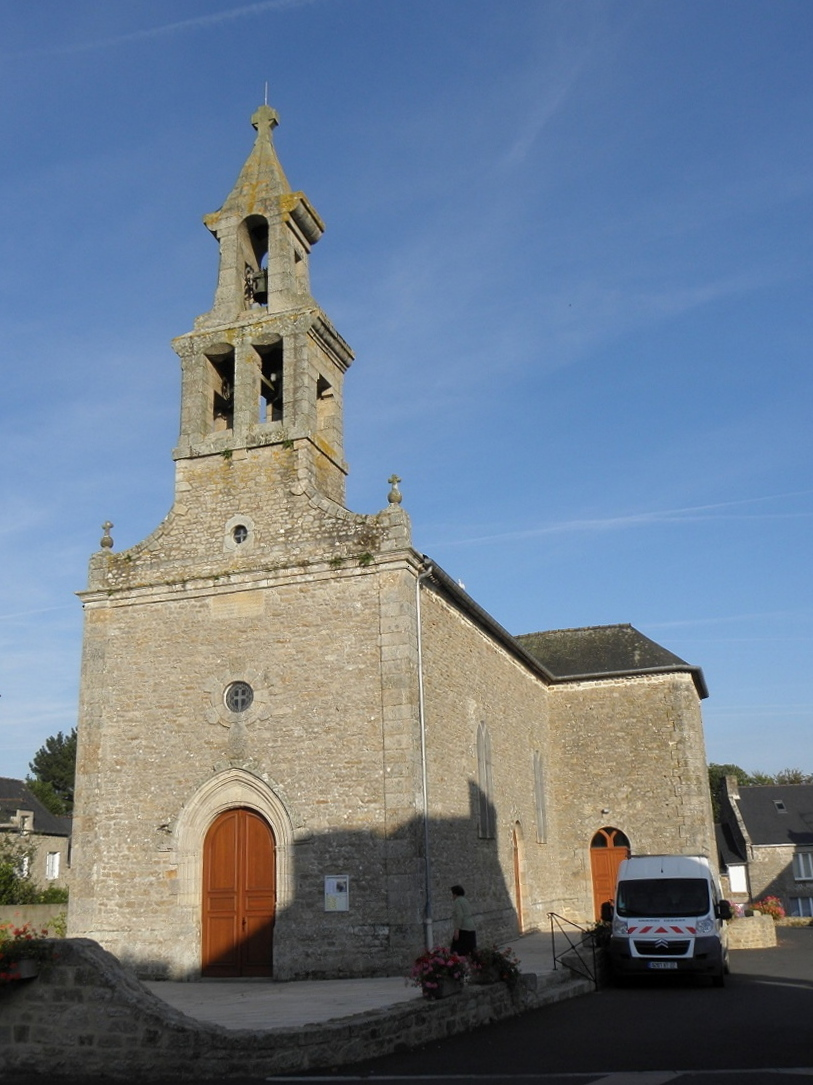 Église paroissiale Saint-Magloire à Trélivan (22).